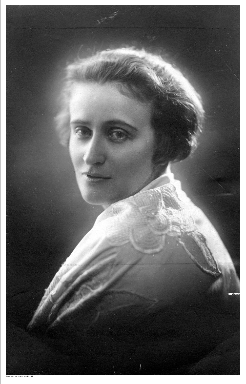 Портретна фотография на Кажимера Илаковичувна, полска поетеса.